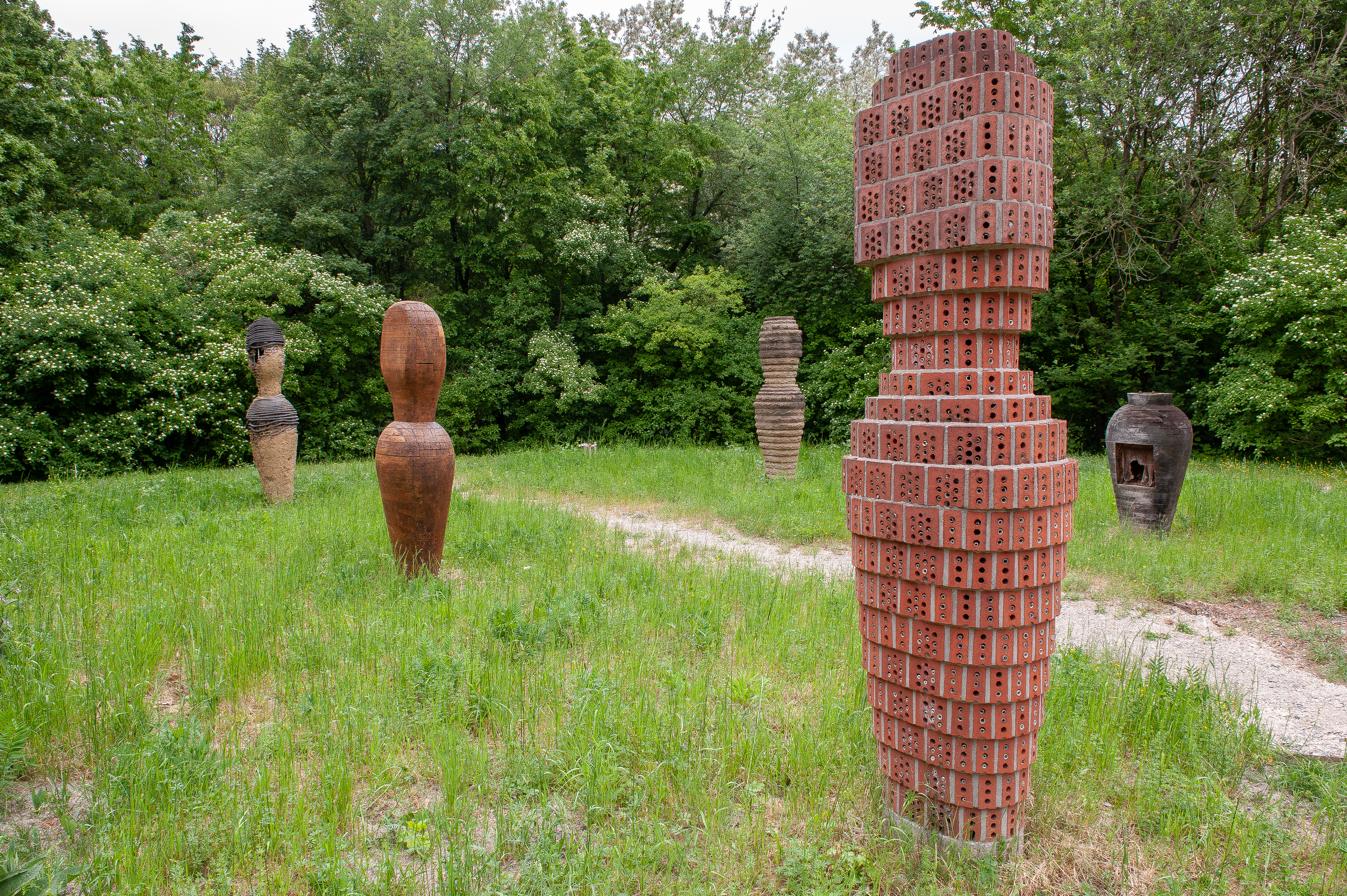 Kunststation "Bienengarten" von Jeanette Zippel, Gelände der Internationalen Gartenbauausstellung 1993, Stuttgart